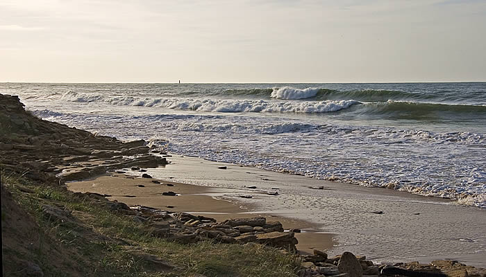 Le Lizay - Les Portes en Ré - île de Ré - Charente-Maritime Photo issue de ma banque d'images : Pep.per 8 octobre 2006 à 00:51 (CEST)